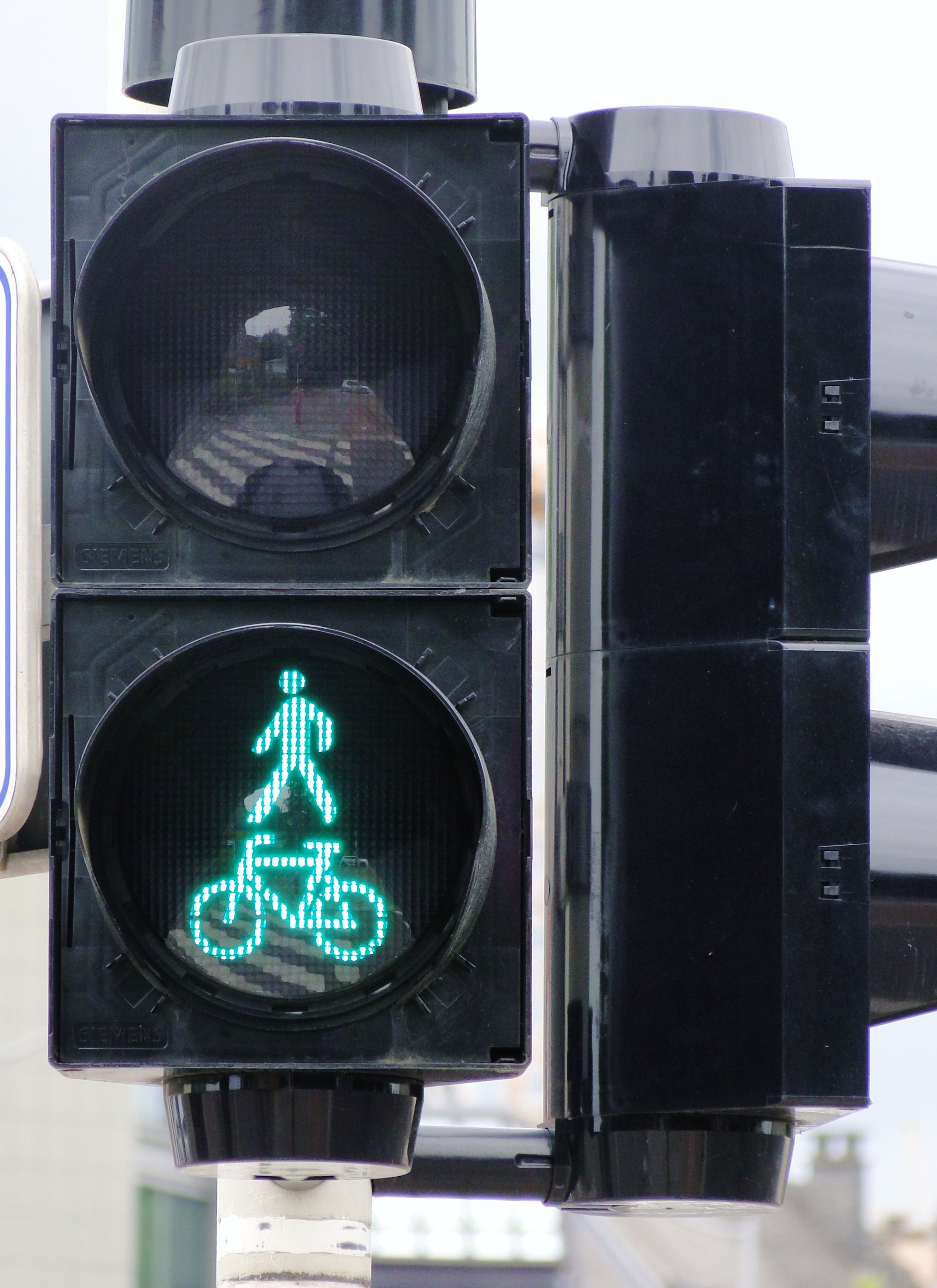 Verkéiersluucht Lëtzebuerg - Foussgänger a Vëlosfuerer gréng